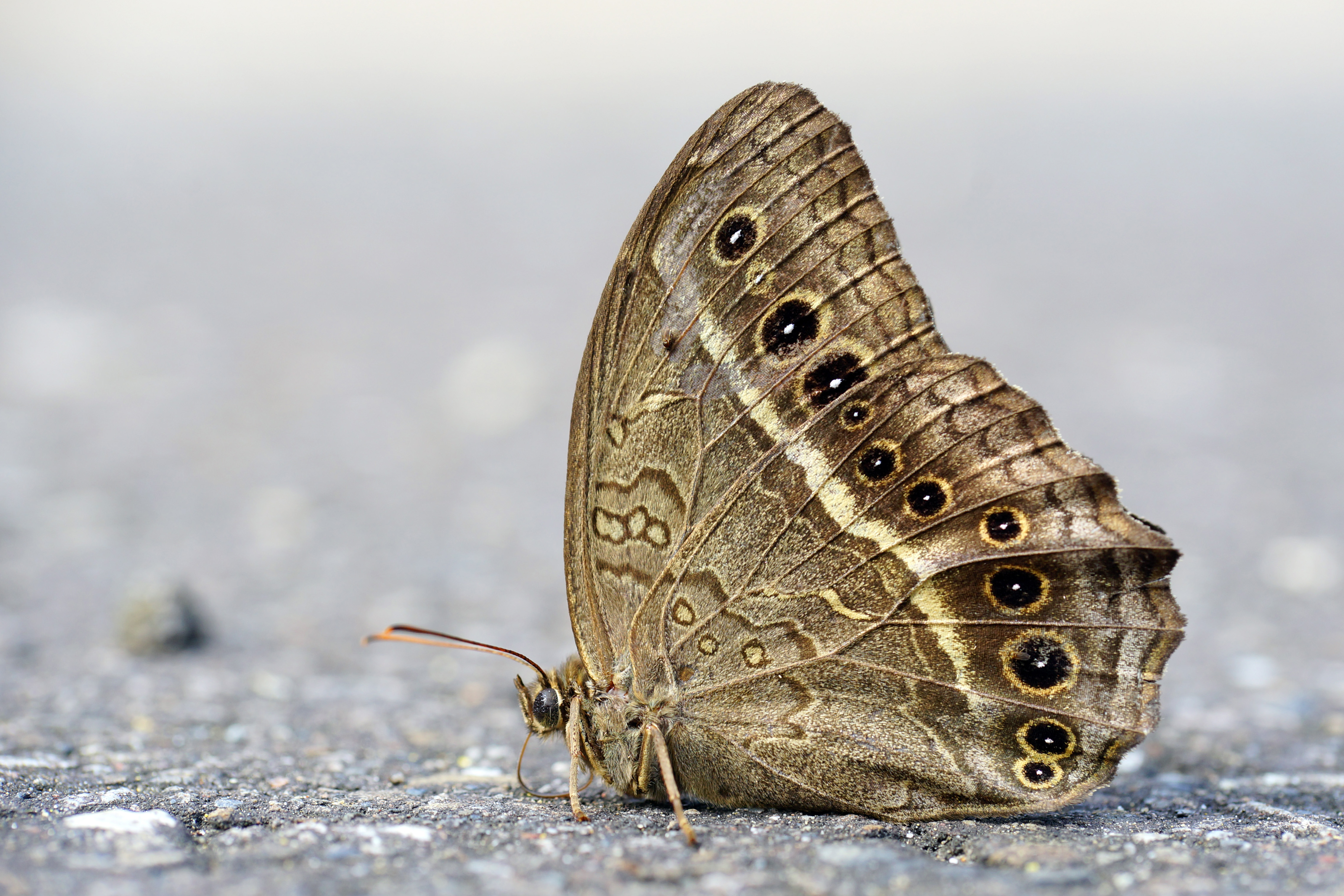 褐翅蔭眼蝶 Neope muirheadi nagasawae